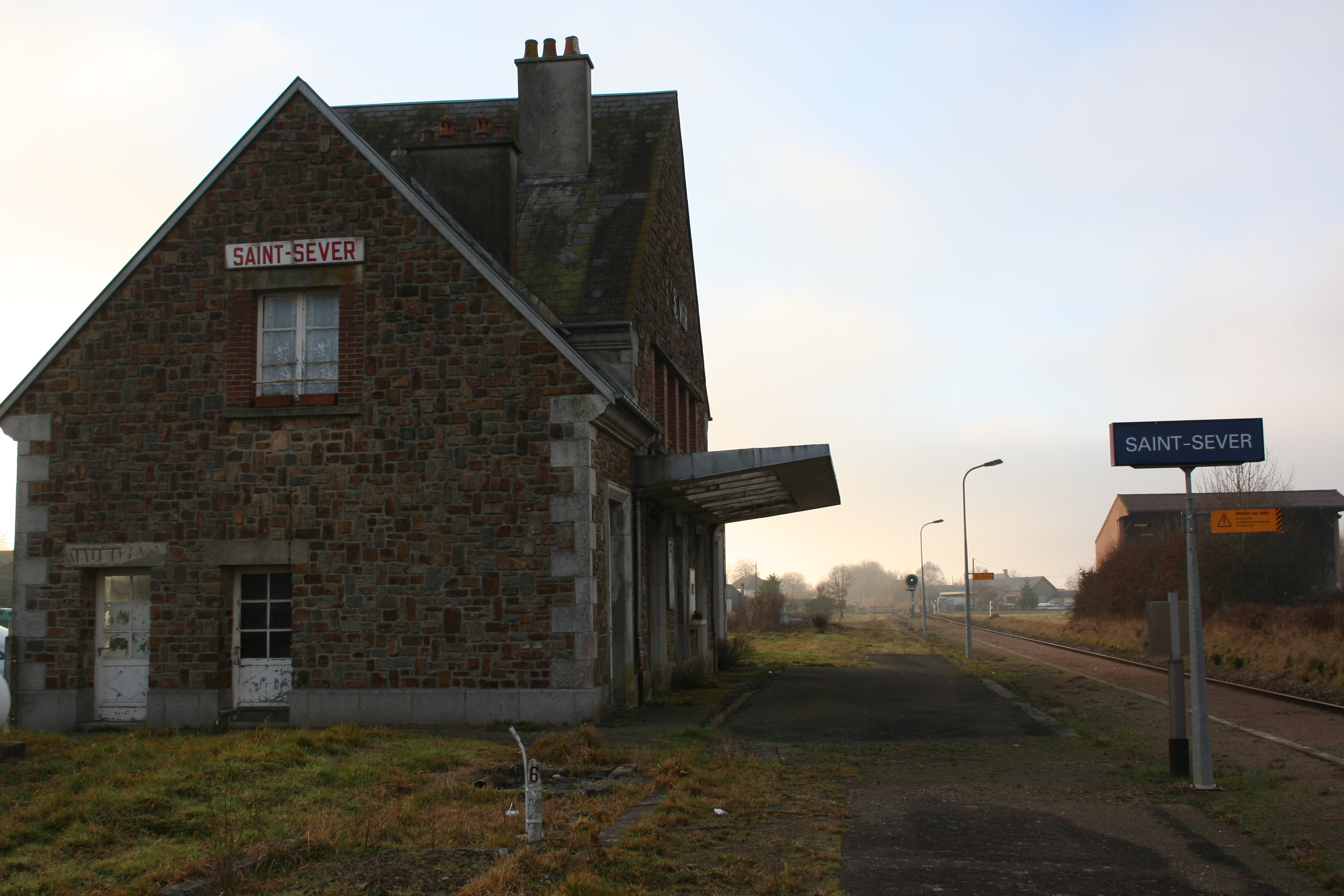 gare ferroviaire de saint-sever - Calvados - France